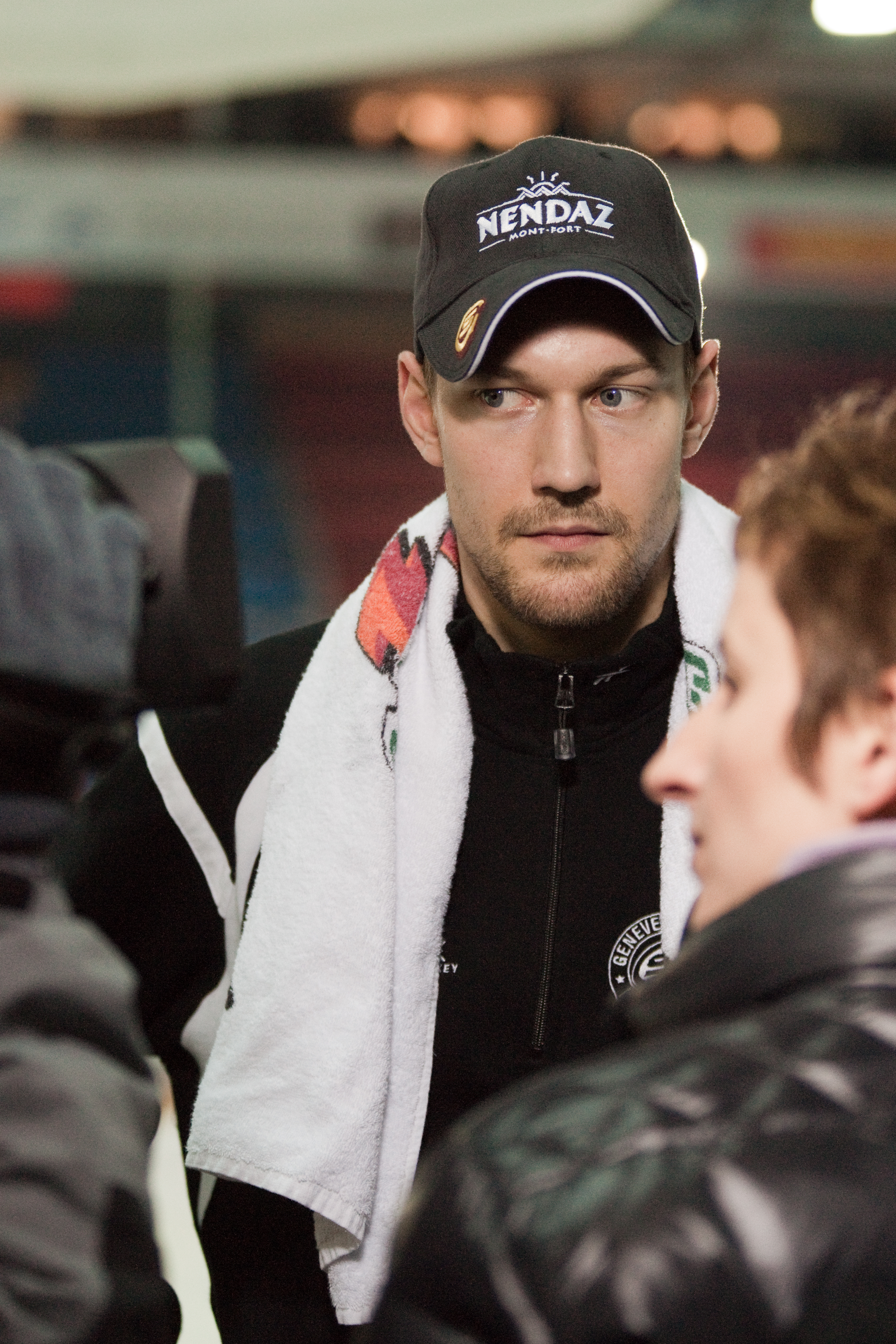 Tobias Stephan à l'issue du match contre Fribourg-Gottéron le 6 mars 2010.